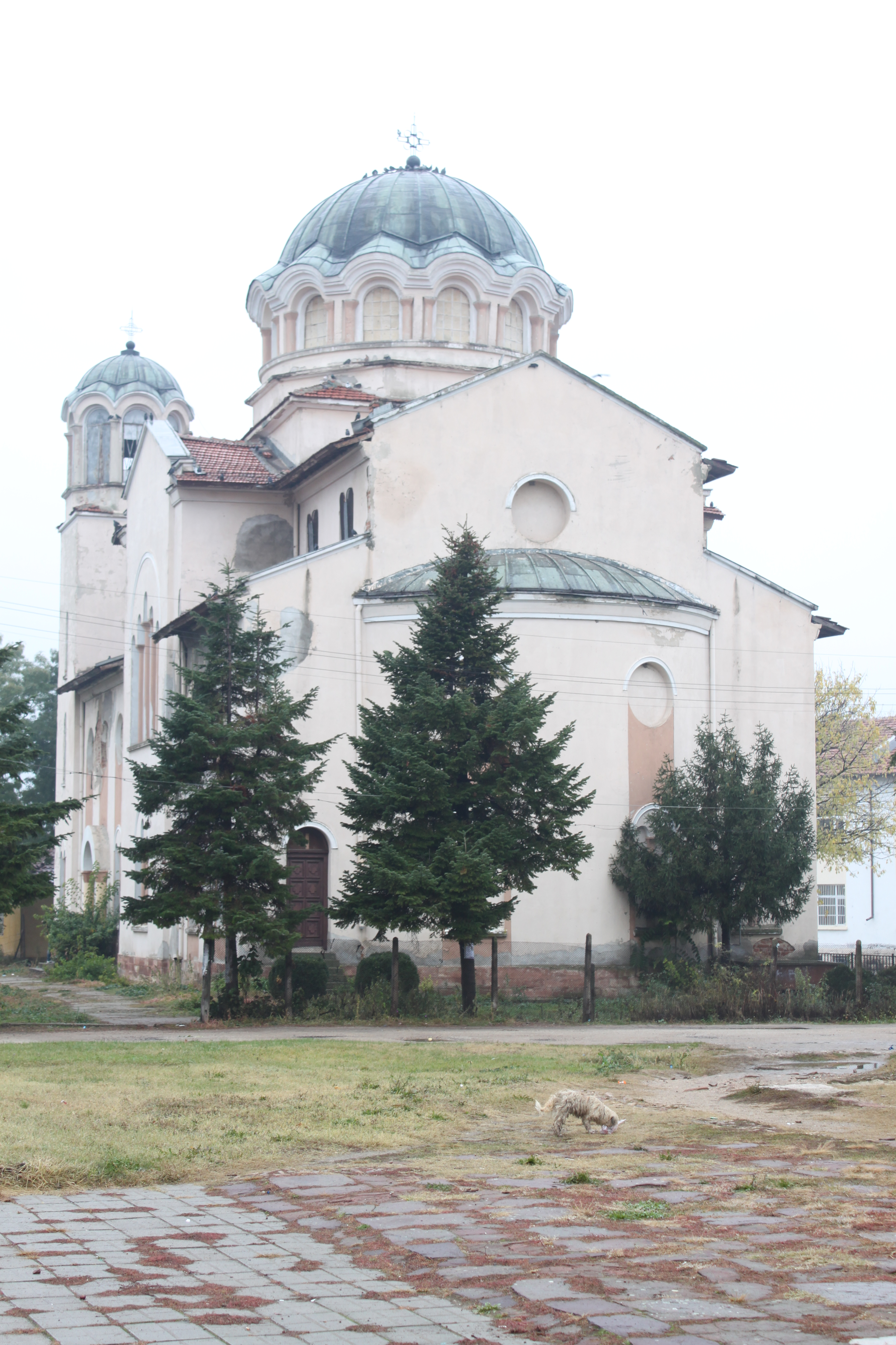 die antike römische Stadt Ratiaria; bei Archar an der Donau - östlich von Widin; das ca. 2 x2 km große Gelände wurde von Schatzsuchern monatelang systematisch mit Baggern umgegraben und druchsiebt, so dass alle archäologischen Schichten und Funde zerstört sind; nur an einer Stelle ist ein gemauerter Bogen übrig geblieben